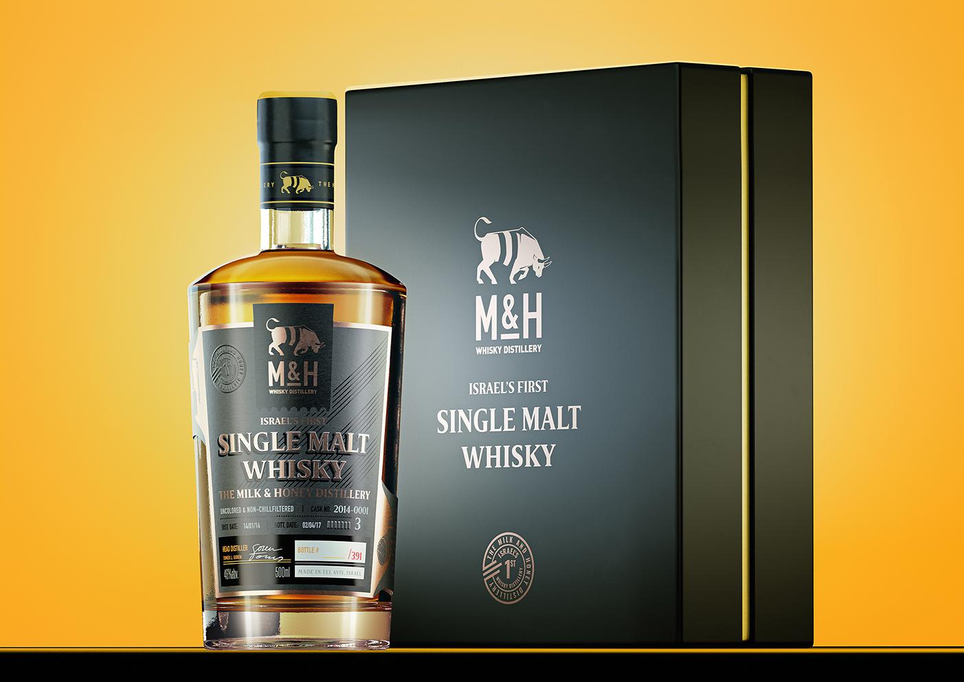 הדמיית הסינגל-מאלט וויסקי הראשון בישראל, מזקקת מילק & האני